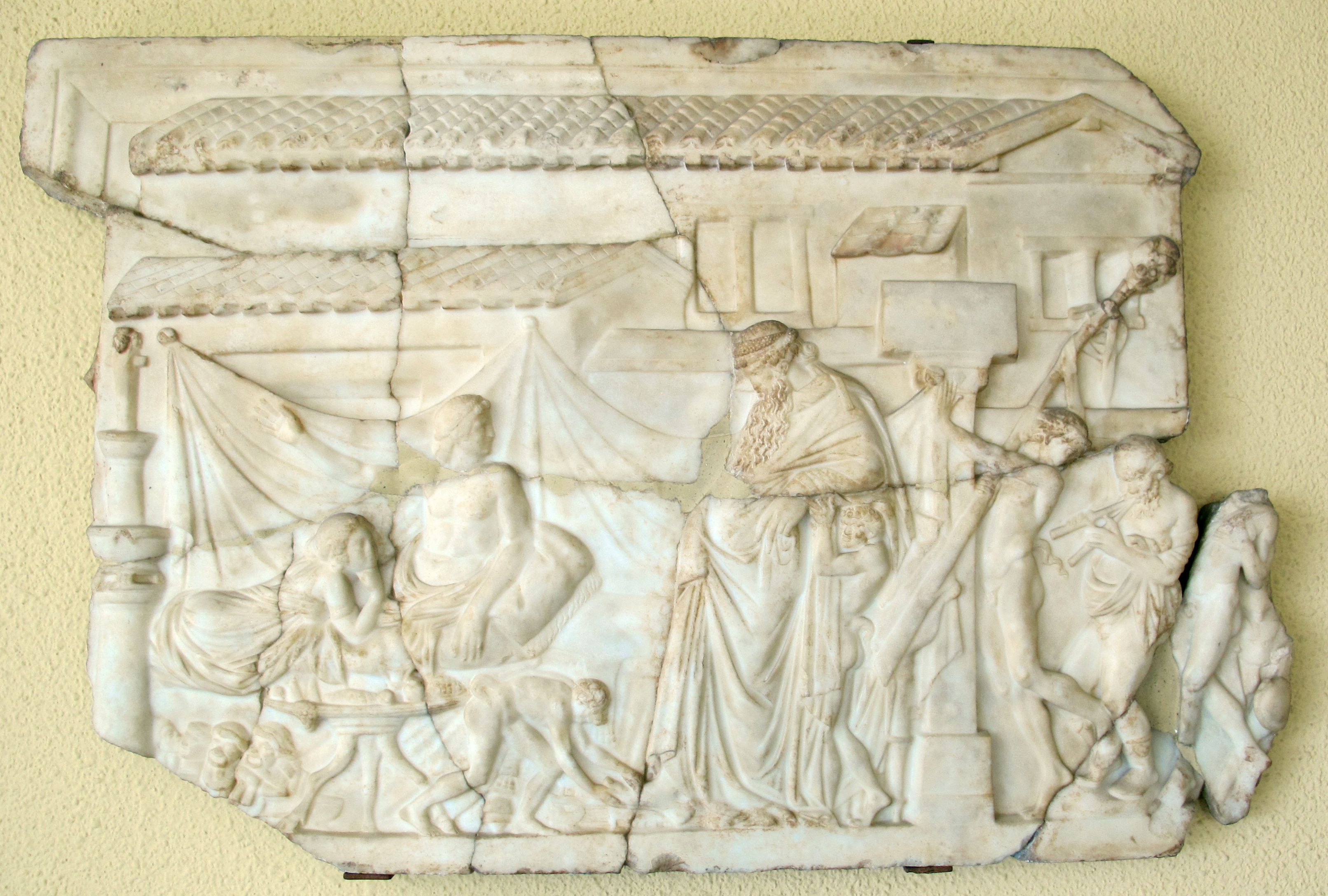 Arte romana, dioniso che visita l'attore ateniese ikarios, da efeso